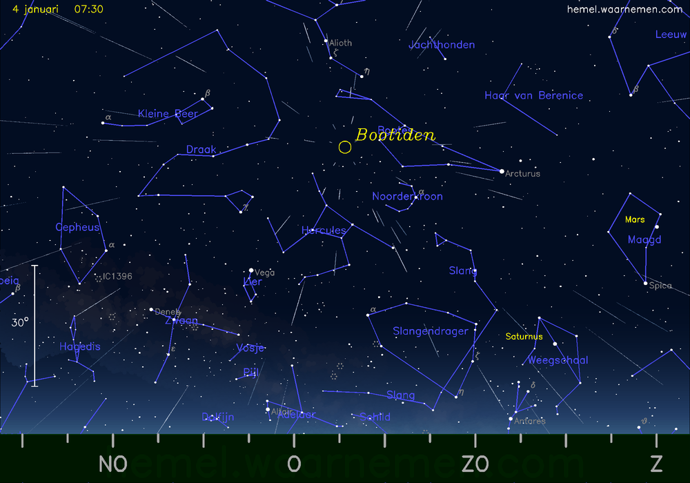 De radiant van de meteorenzwerm Bootiden in de nacht van het maximum op 4 januari 2014. Bron